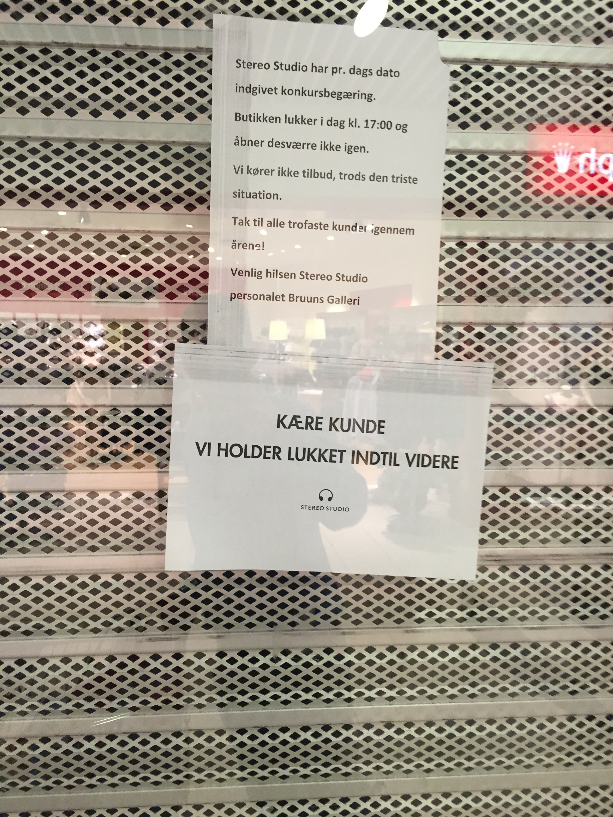 Skilt foran Stereo Studio-butikken i Bruuns Galleri i Århus.